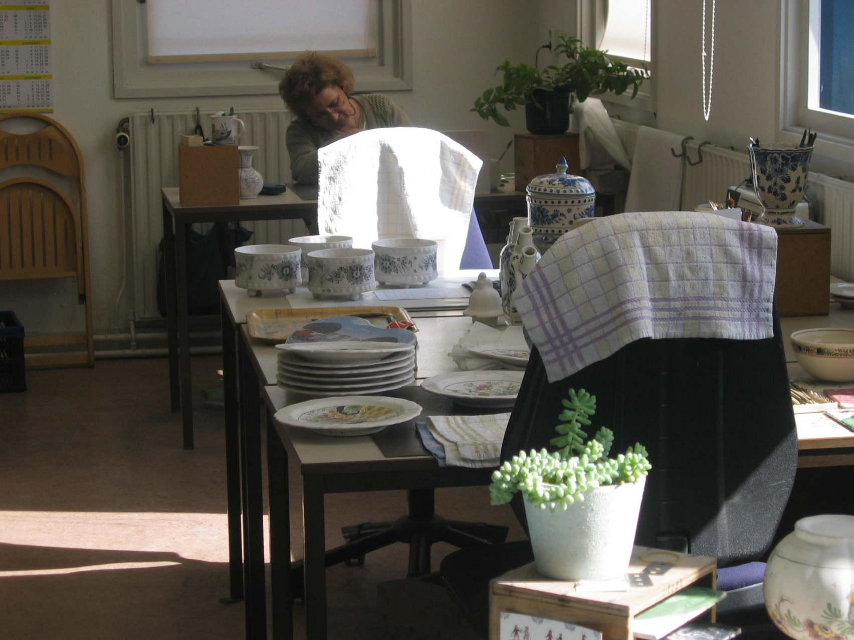 Porselensmaling i Delft